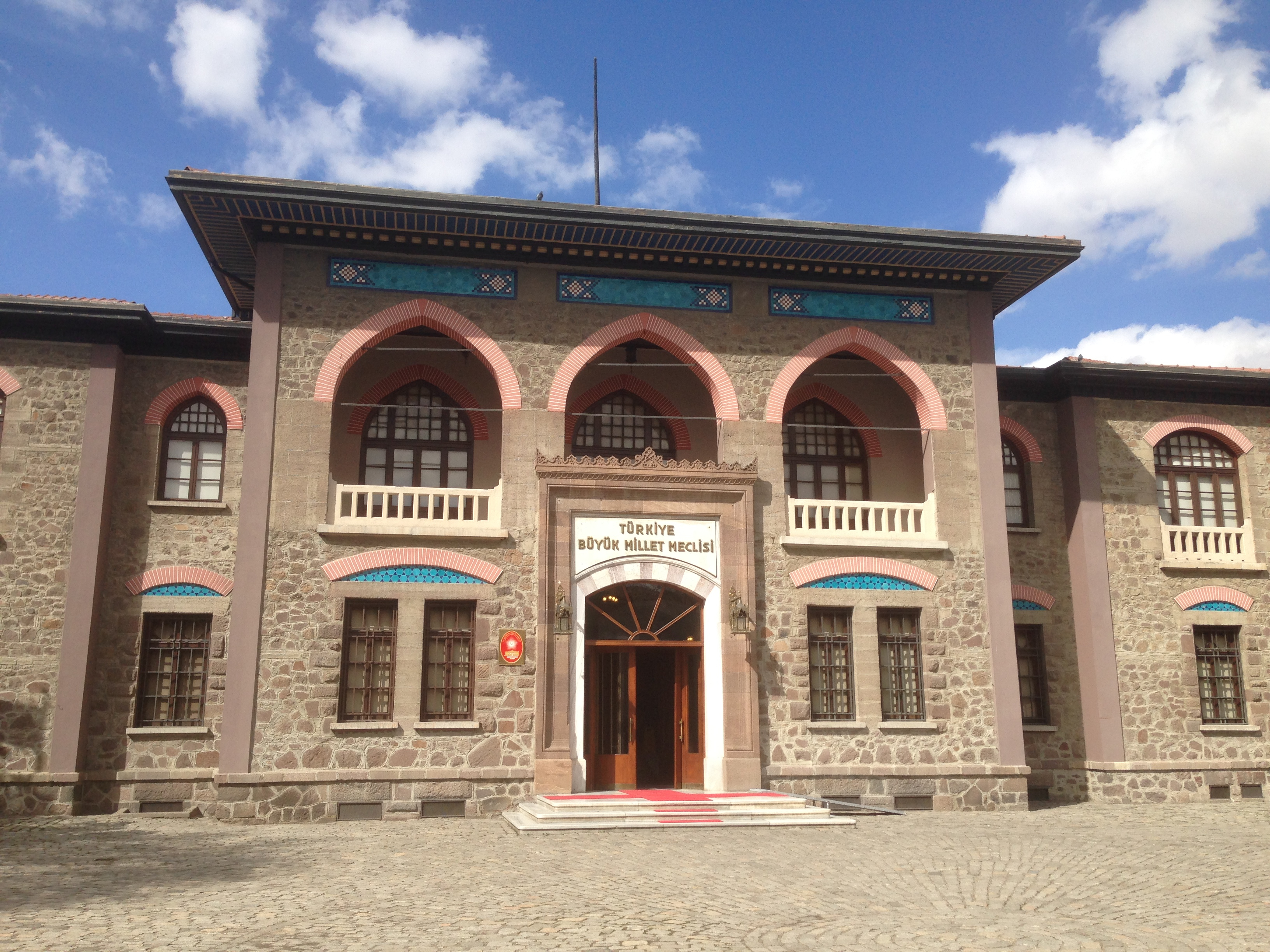 TBMM birinci meclis